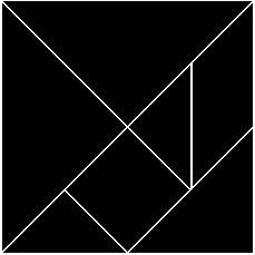 Tangram: Solution du carré Image éditée par Dimola à partir de Image:Tangram diagram.png.